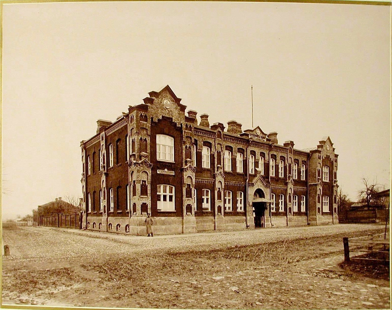 Беларуская (тарашкевіца): Магілёў (Mahiloŭ), вуліца Малая Садовая (vulica Małaja Sadovaja). Будынак Чырвонага крыжа (Čyrvony kryž)